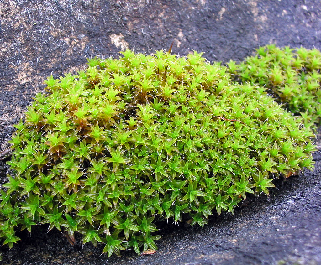 Dach-Drehzahnmoos (Tortula ruralis)